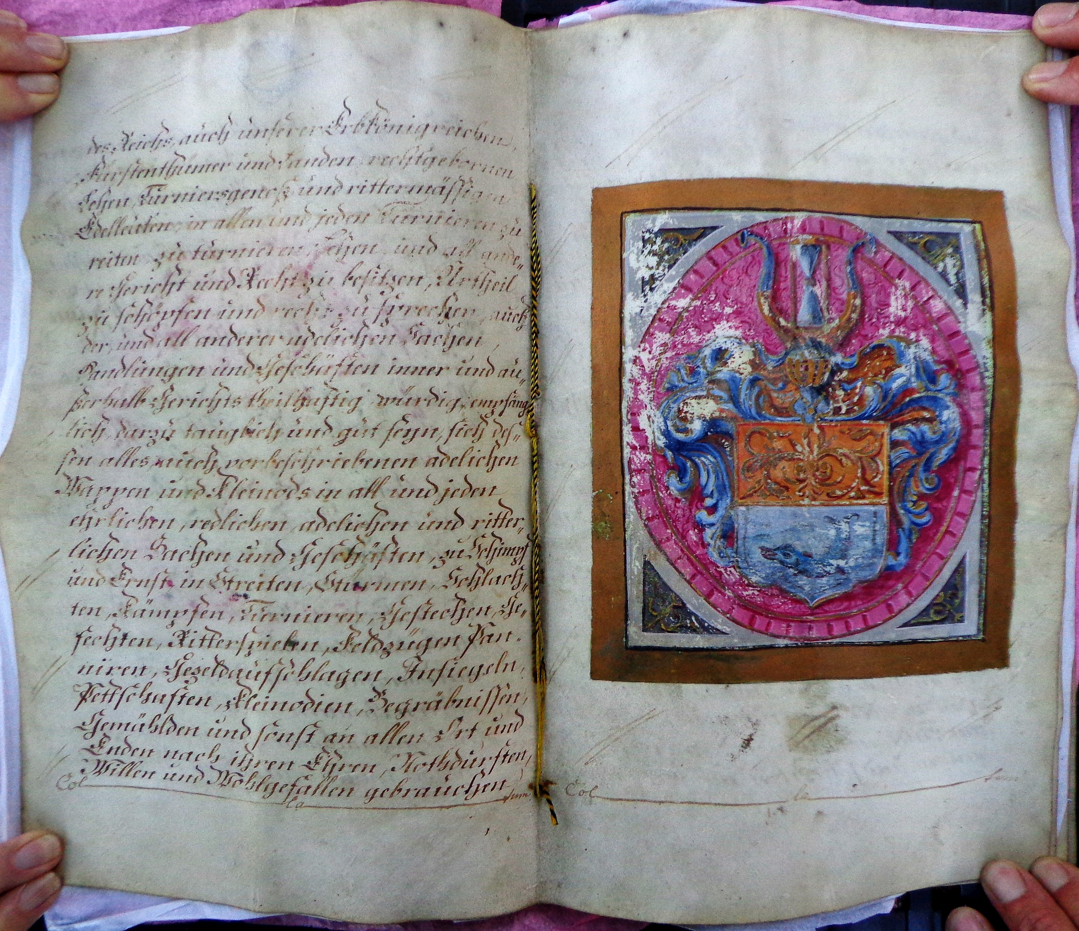 Adelsbestätigung Kaiser Leopolds I. für Johann Baptist von Pflachern (Wien 5. September 1700)